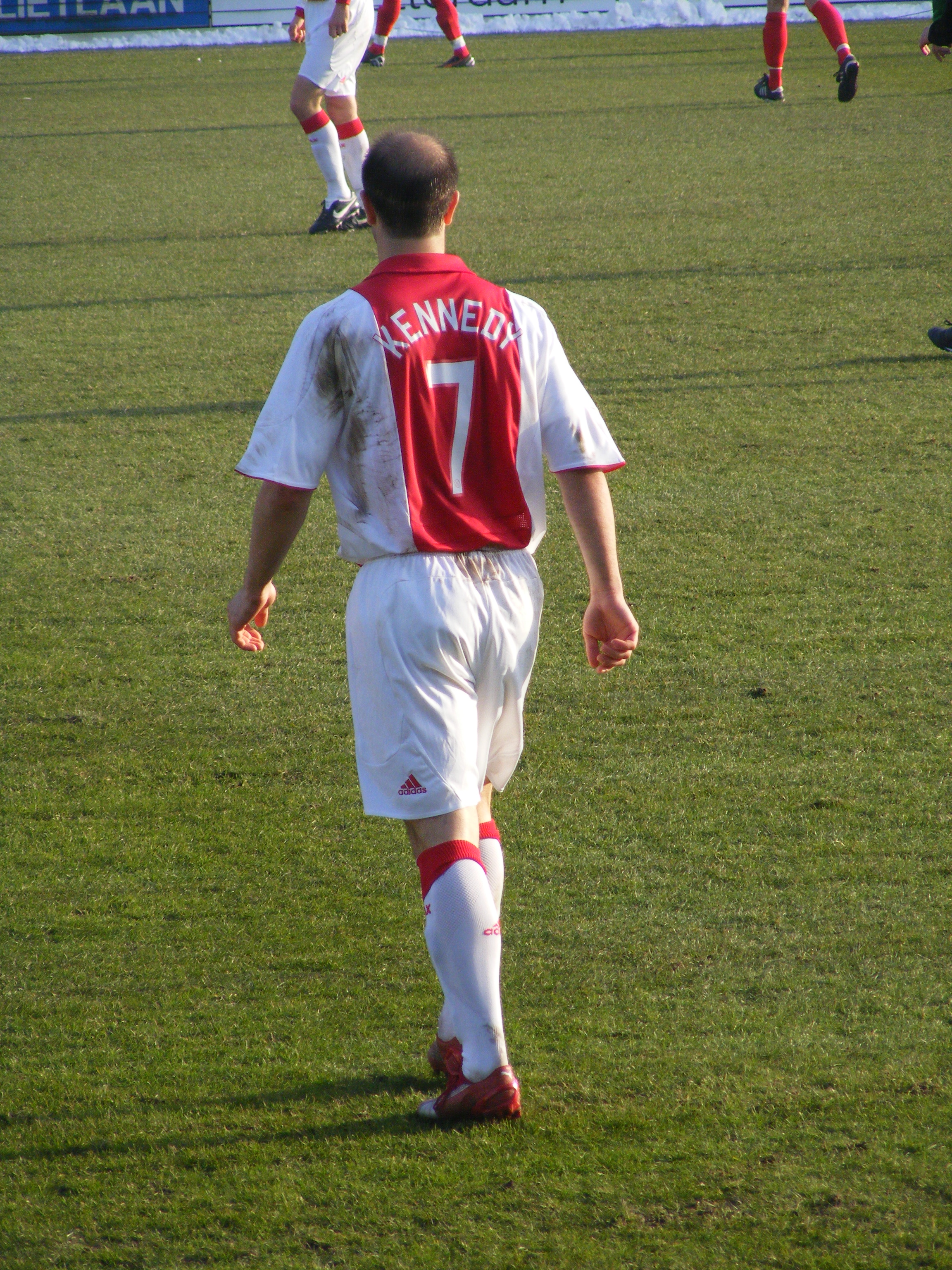 Kennedy Bakircioglu in actie voor Ajax tegen Excelsior